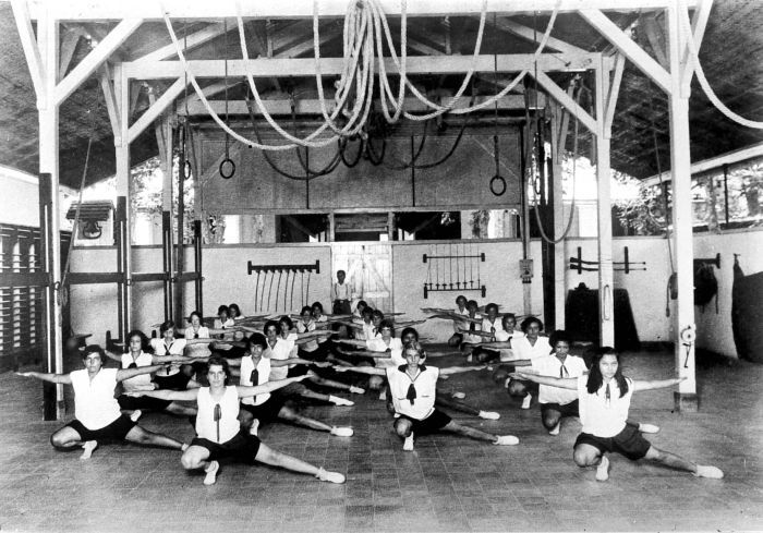 Repronegatief. Na de oprichting van de Hollands-Inlandse scholen moesten er ook vervolgopleidingen komen. Daarvan was de MULO (Meer Uitgebreid Lager Onderwijs), een uit Nederland stammend schooltype, het eerste, waarna in 1919 de AMS (Algemene Middelbare School) tot stand kwam, bedoeld als vervolg op de MULO. Net als in Nederland waren er verder de Hogere Burgerschool (HBS), Middelbare Meisjesschool (MMS) en het Lyceum. Deze laatste drie schooltypen hadden in 1939 tezamen 6.407 leerlingen, van wie 4.845 Europeanen, 724 Indonesiërs en 838 'vreemde Oosterlingen' (vooral Chinezen). Zeker geen indrukwekkende aantallen wat de Indonesiërs en de Chinezen betreft. (P. Boomgaard, 2001). Gymnastiekonderwijs op de H.B.S. te Semarang, Midden-Java Gymnastiekles op de HBS, Semarang, Midden-Java, ca. 1925